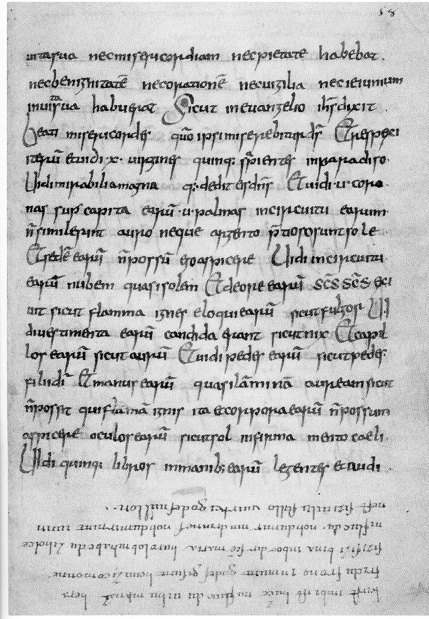 Lorscher Bienensegen